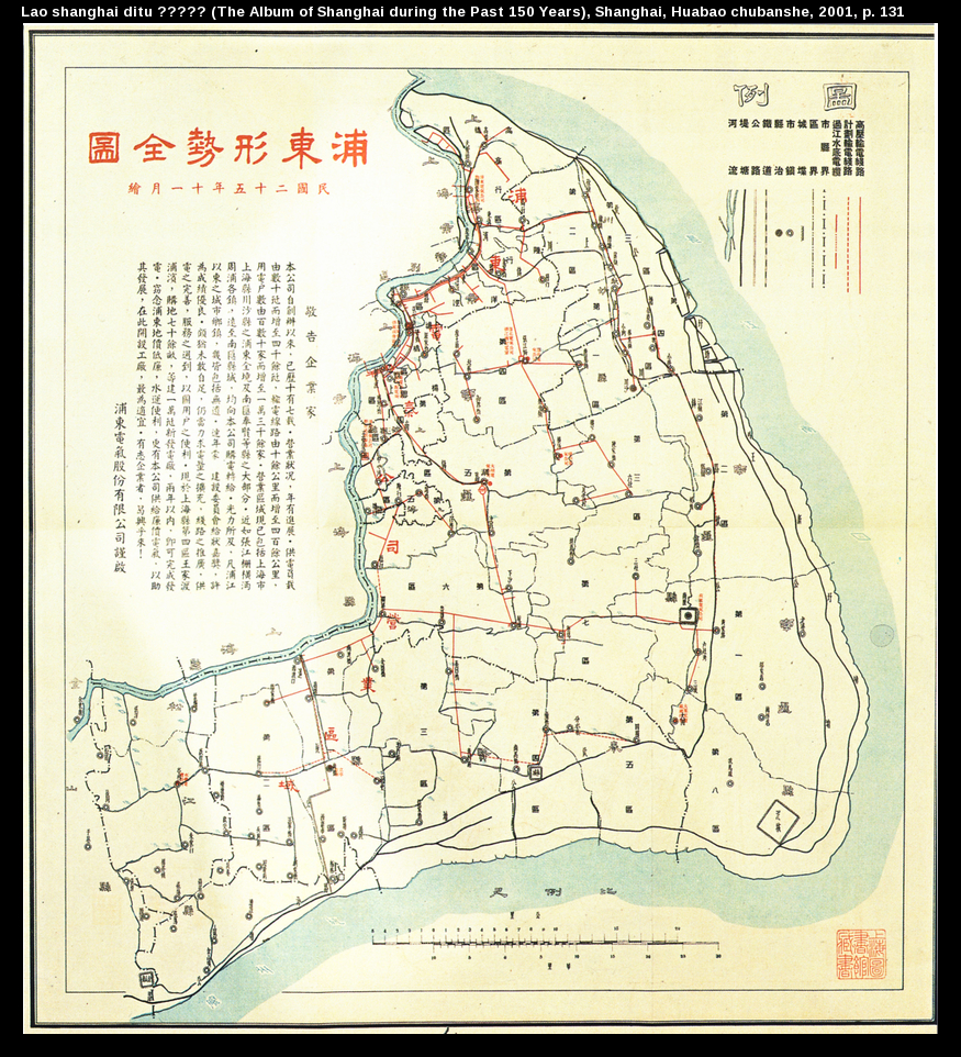 1936年的浦东地图，包括红色为供电线路。浦东电力公司制作。